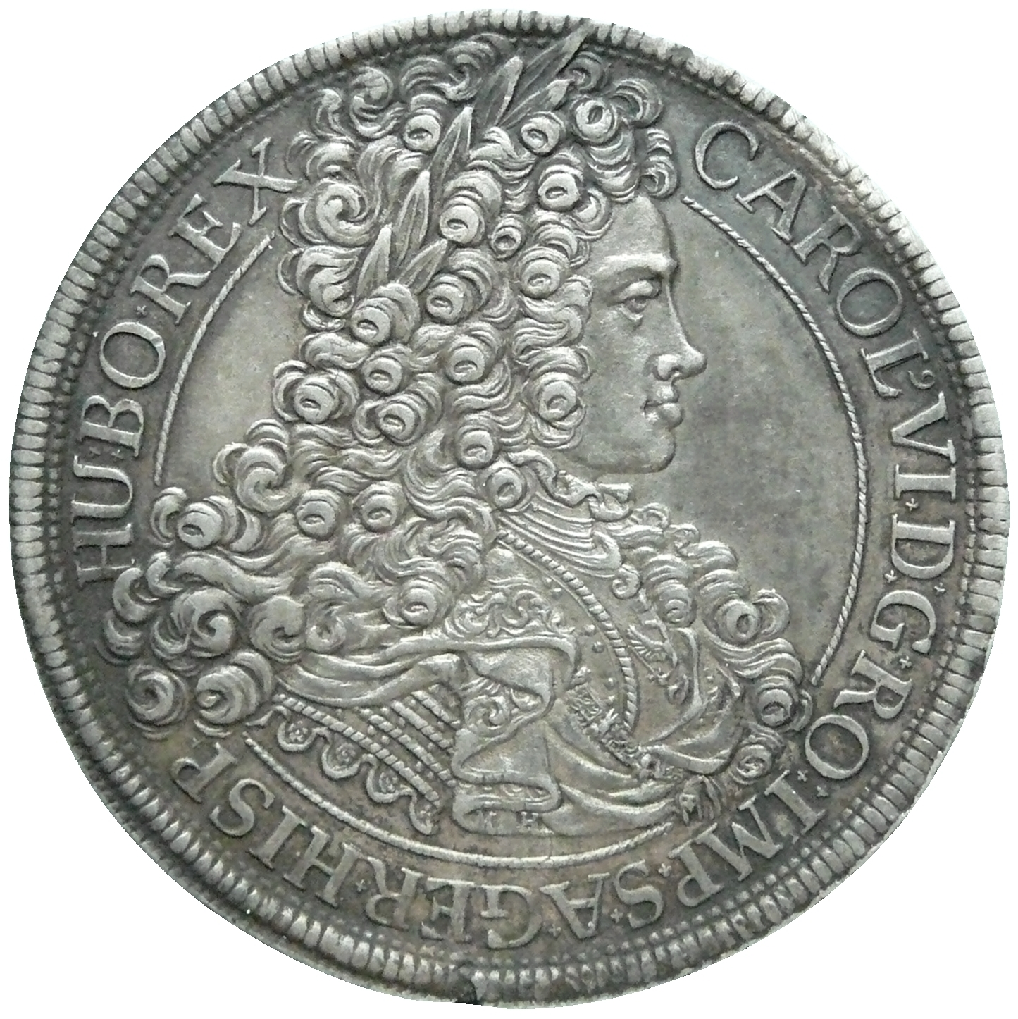 Österreichischer Reichsspeziestaler Antrittstaler 1712 Kaiser Karl VI. Vom Reichsmünzfuß abweichende Prägung 8,11 Stück a.d.r. Mark, 9,24 Stück a.d.f. Mark Silber 14 Lot 1 Grän = 878,5‰ Feingewicht: 25,318 g Raugewicht: 28,82 g nach Reichsmünzdeputation von 1623 Prägung 1712-1718 Münzstätte Wien Münzmeister Franz Joseph Mittermayer von Waffenberg (1709-1726) Münzeisenschneider Johann Michael Hoffmann (1680-1736) Außerkurssetzung nach Einführung des Konventionsmünzfußes 1748 für 1 Taler 10 Groschen Konventionsgeld Gewicht: 28,51 g Durchmesser: 43,16-43,55 mm Dicke: 2,43 mm Laubrand großes Brustbild des Kaisers mit Allongeperücke im antikem Prunkharnisch mit Kette vom Goldenen Vlies und goldenen Widderfell, in der Falte des umgeworfenen Mantels die Künstlersignatur M.H. Titelumschrift begrenzt von Schnurkreis oben beginnend nach rechts, wiederholt durch Bildnis unterbrochen: CAROLUS VI DEI GRATIA ROMANORUM IMPERATOR SEMPER AUGUSTUS GERMANIAE HISPANIAE HUNGARIAE BOHEMIAE REX = Karl VI. von Gottes Gnaden Römischer Kaiser, zu allen Zeiten Mehrer des Reichs, König in Germanien, Spanien, Ungarn und Böhmen